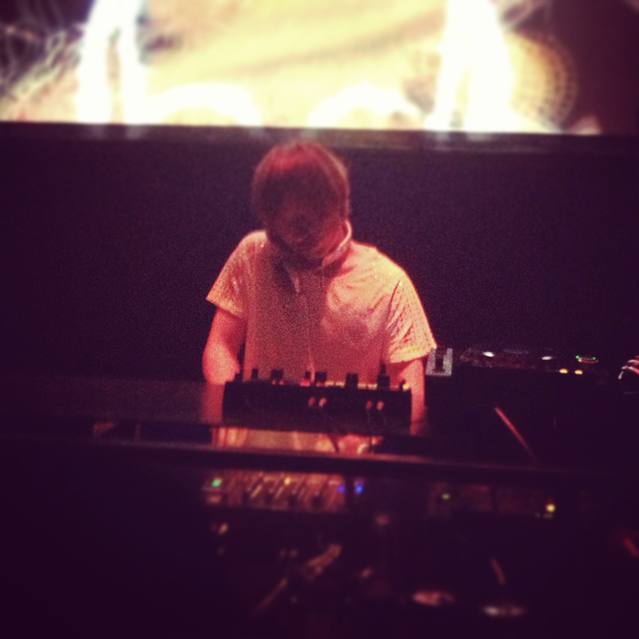 Yasutaka Nakata en Flash!!! Party en Julio del año 2013